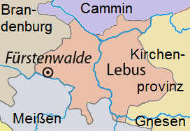 Bistum Lebus vor der Reformation (Diözesangrenzen)